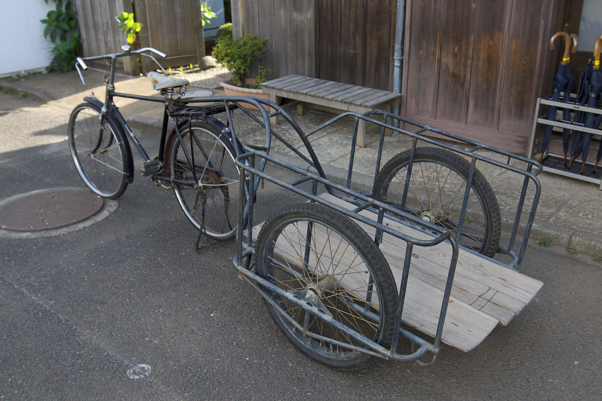 リヤカーと自転車。江戸東京たてもの園。